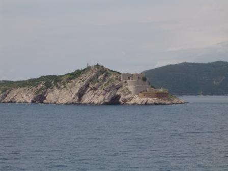 Pevnost na ostrově Mamula